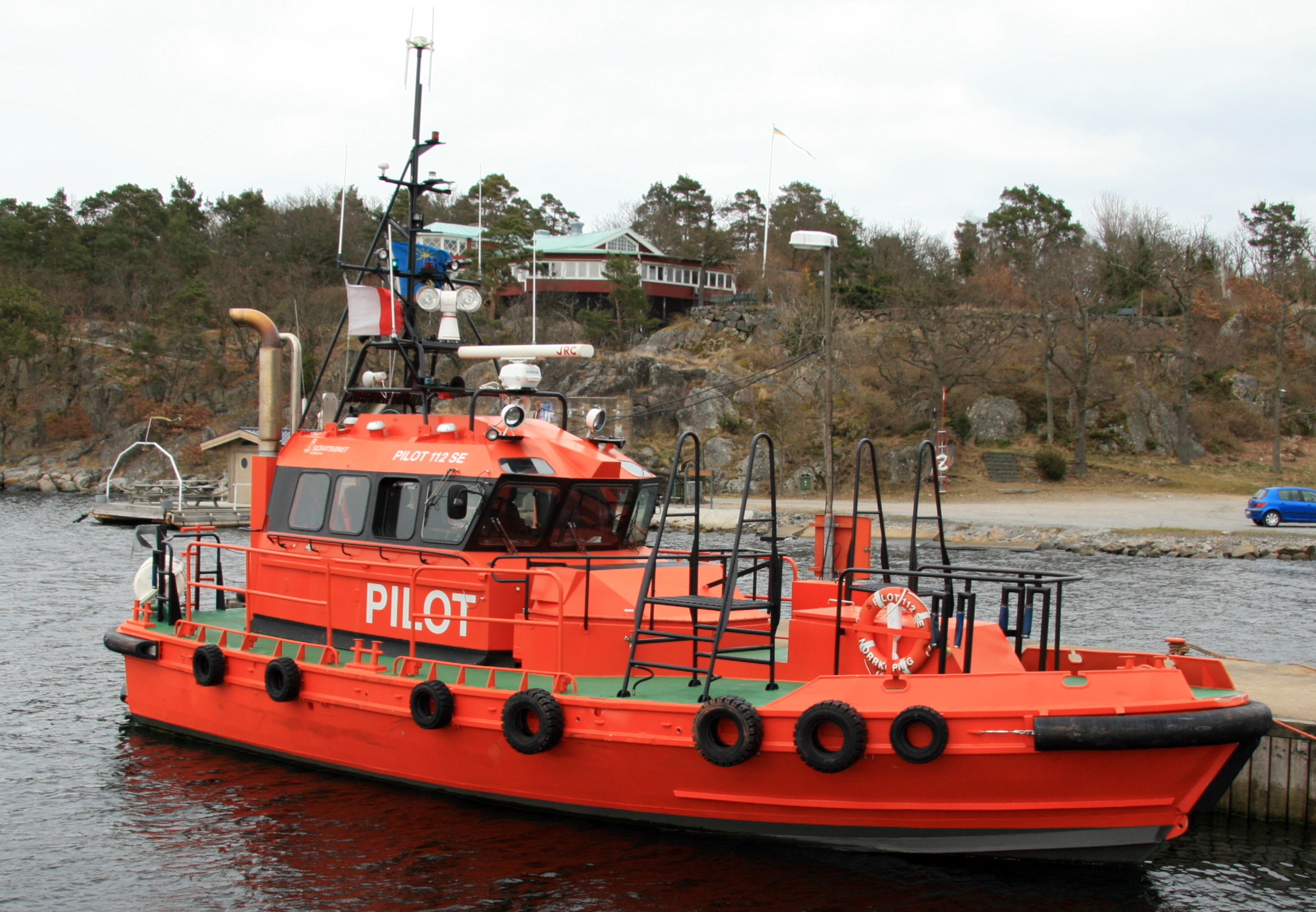 Pilot 112 SE i Karlshamn 19 mars 2008